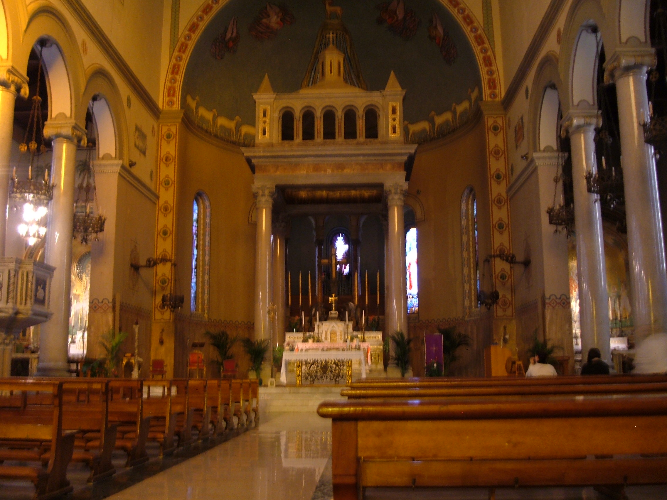 Basilica di Santa Croce a Via Flaminia, a Roma, nel quartiere Flaminio.